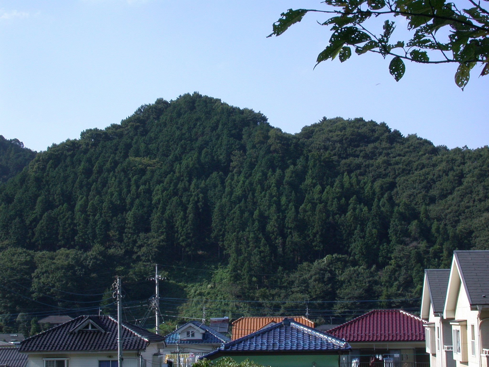 Jofukuji Castle